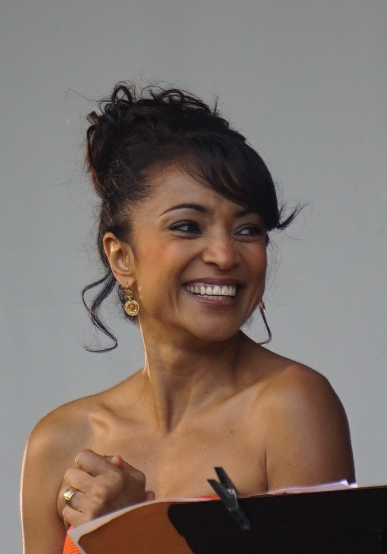 concert aux "Crayères".